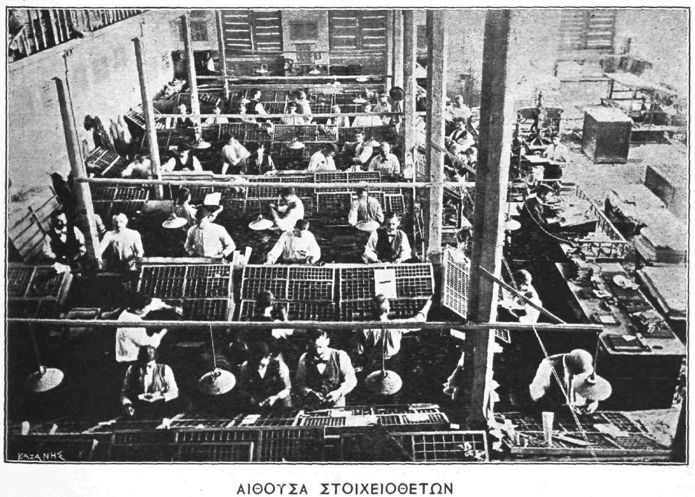 Αίθουσα στοιχειοθετών εκδοτικού οίκου του Ανέστη Κωνσταντινίδη. 19ος αιώνας.